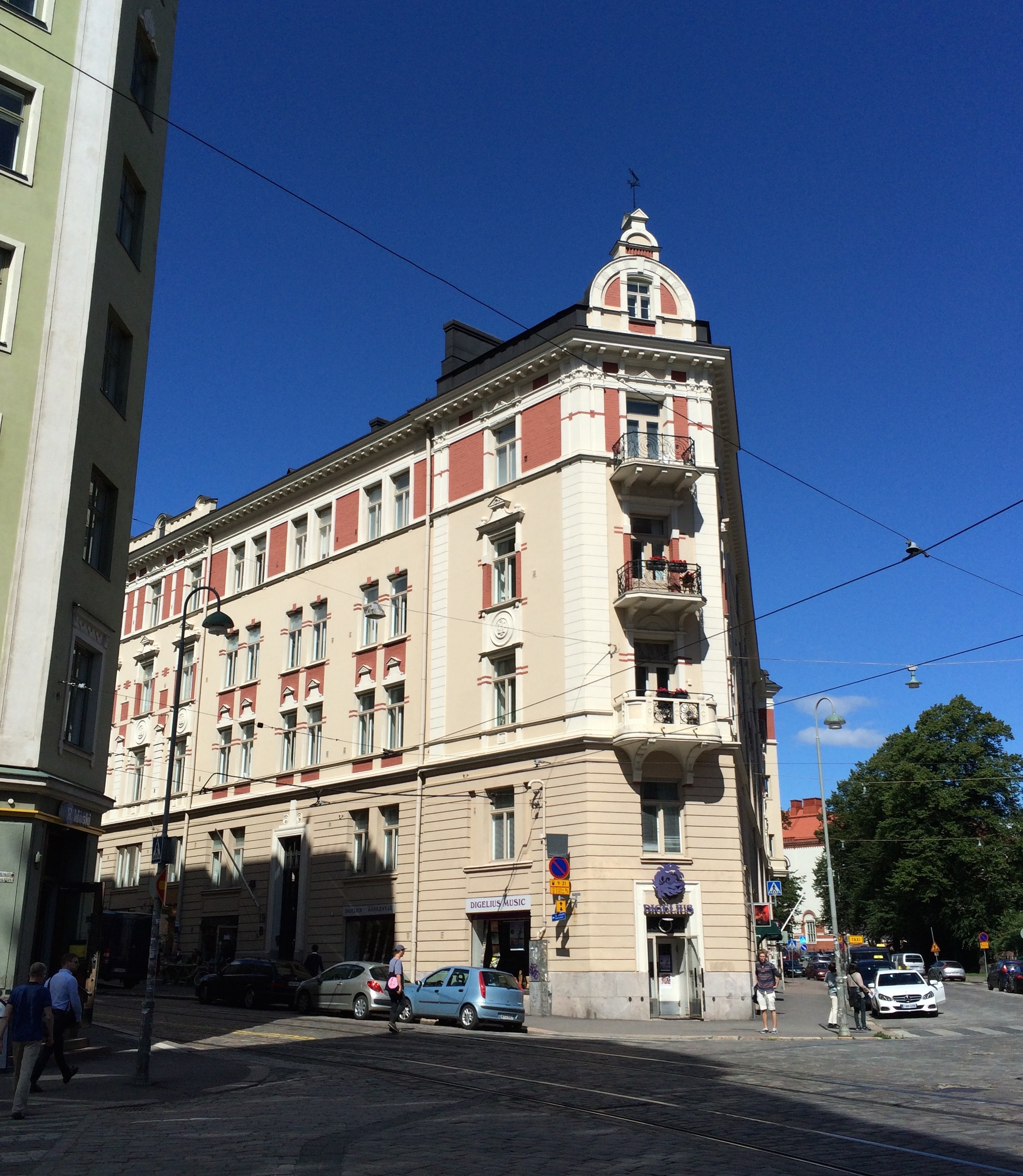 Helsingin Viiskulman pohjoisimmassa sektorissa sijaitseva rakennus, jossa toimii mm. Digelius Music.